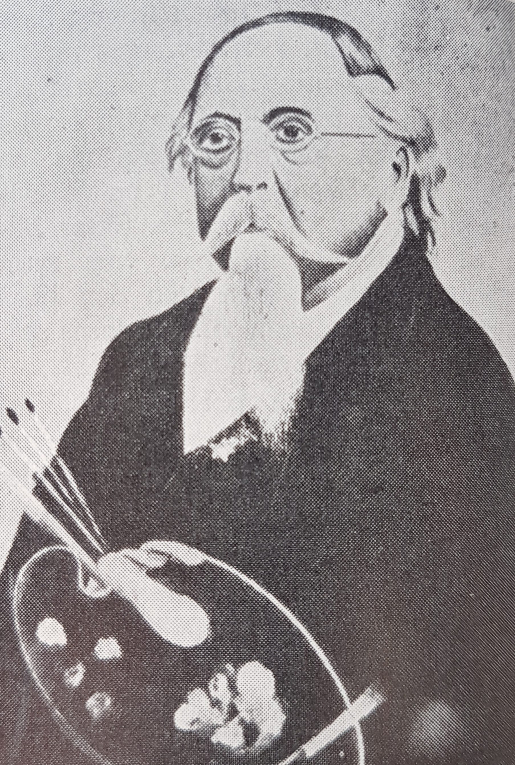 Olof Krans självporträtt , avfotograferad porträttbild från Allhems Svenskt konstnärslexikon.